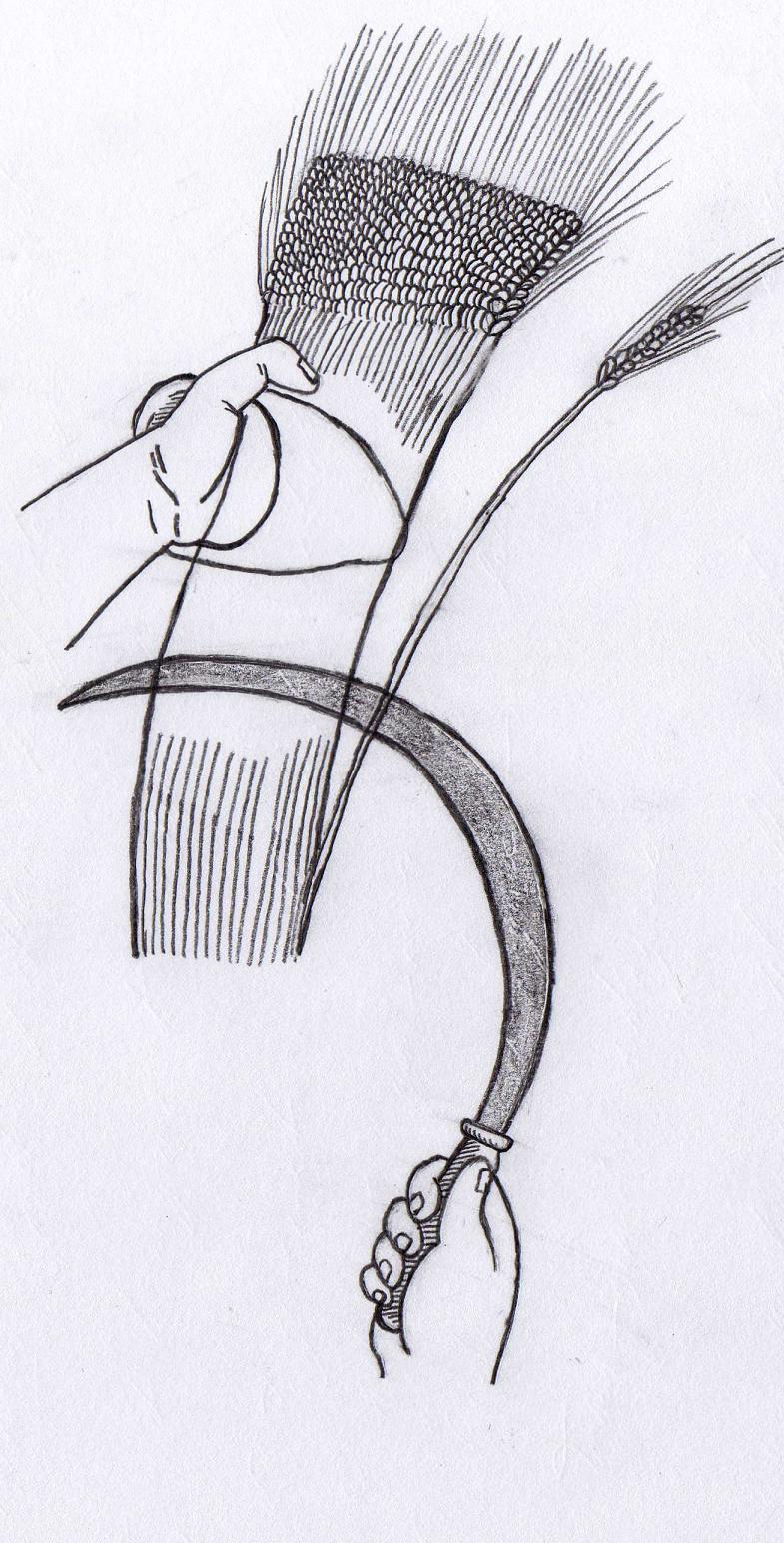 Modo de emplear la zoqueta durante la siega, sujetando las mieses con el pulgar mientras la mano opuesta las segaba con la hoz.